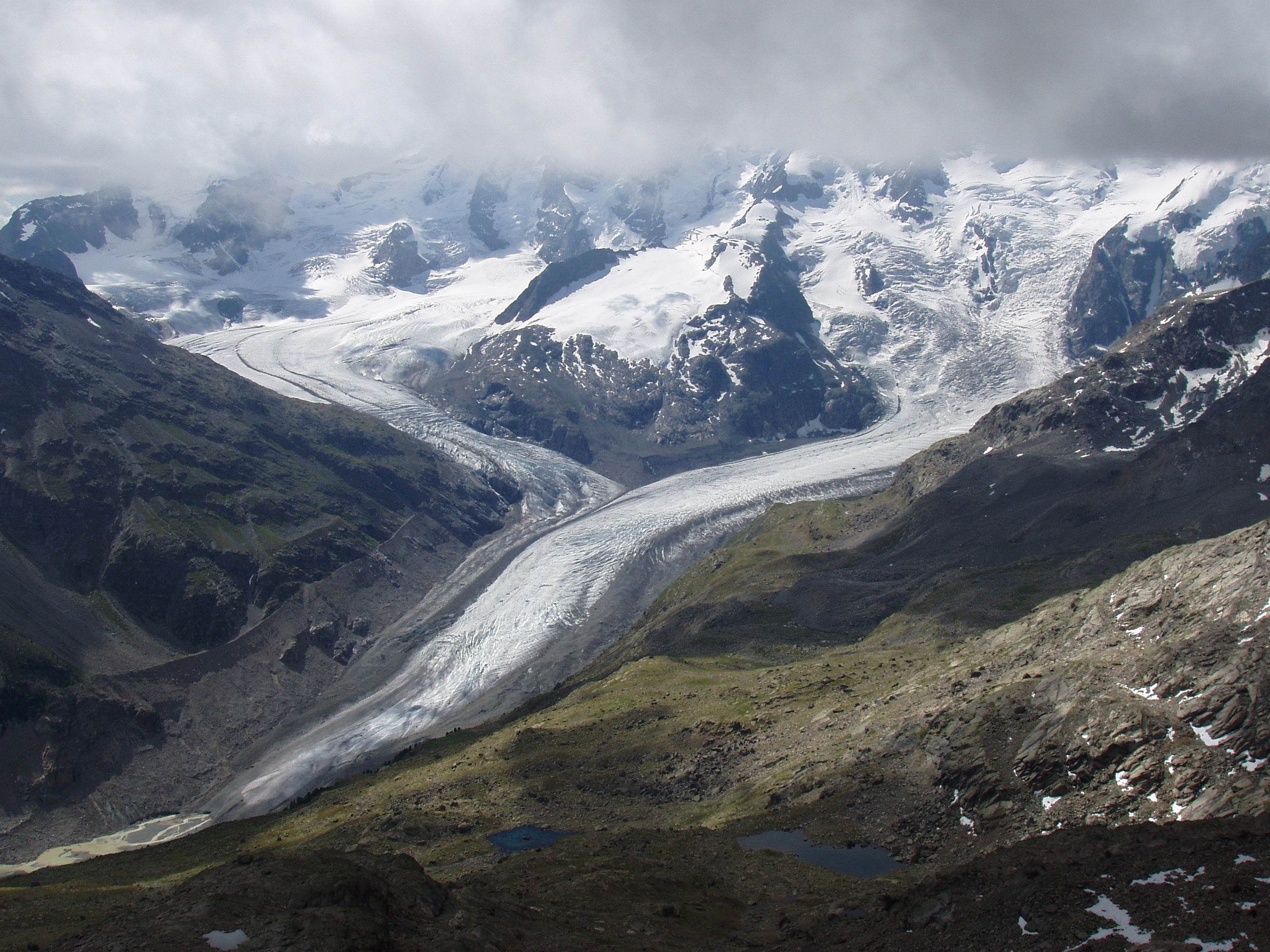 Glacera de Morteratsch i el conflent amb l'afluent Pers (que és la de l'esquerra). Estan situades al massís de la Bernina, a Suïssa.